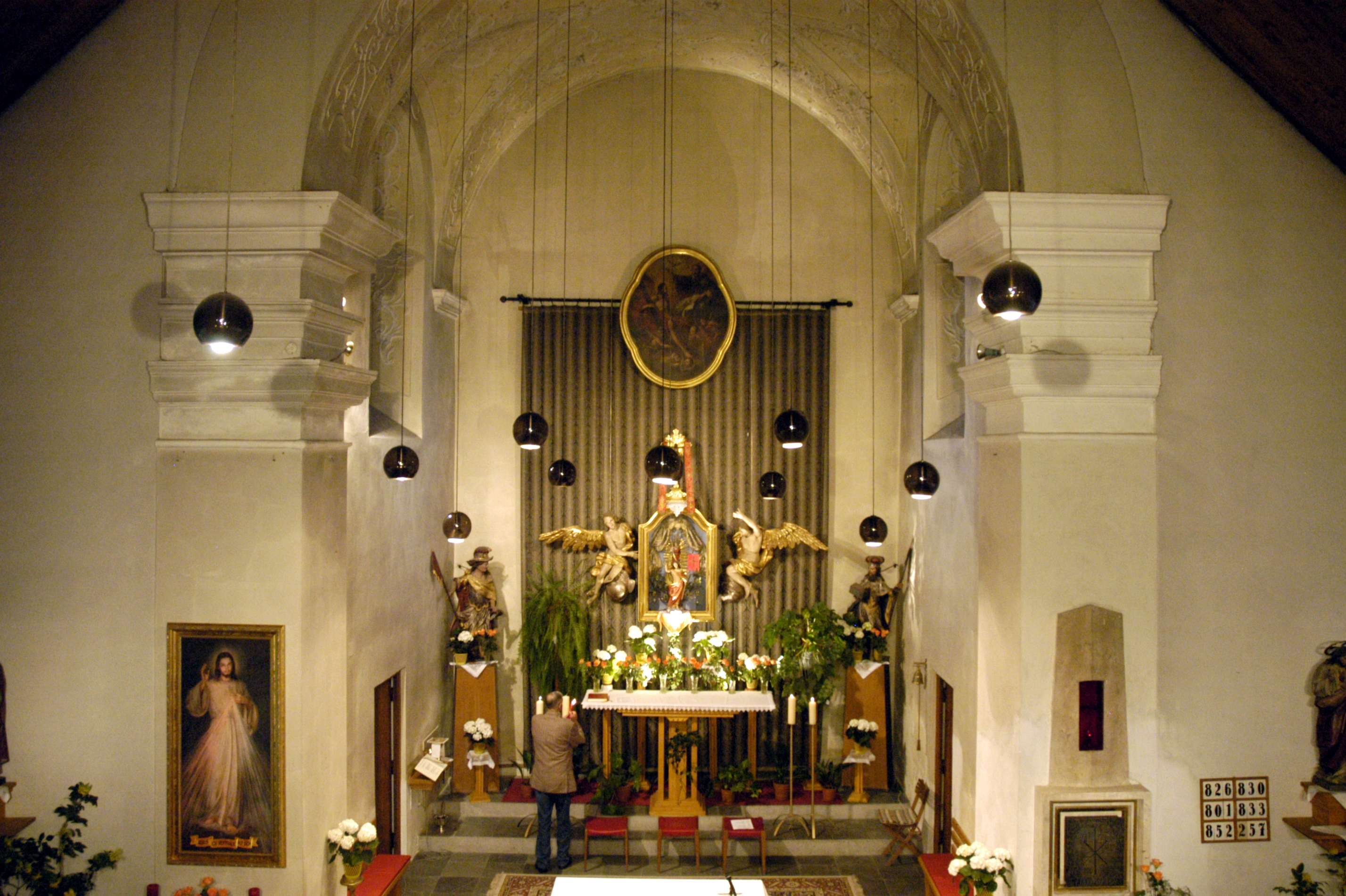 Einblicke nach Osten in die römisch-katholische Pfarrkirche Mariä Geburt in Roseldorf. Gemeinde Sitzendorf an der Schmida